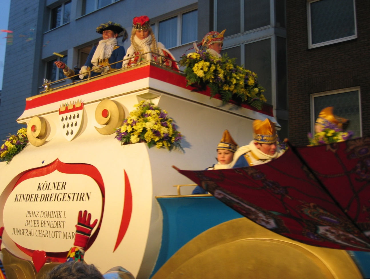 Kölner Kinderprinz 2006